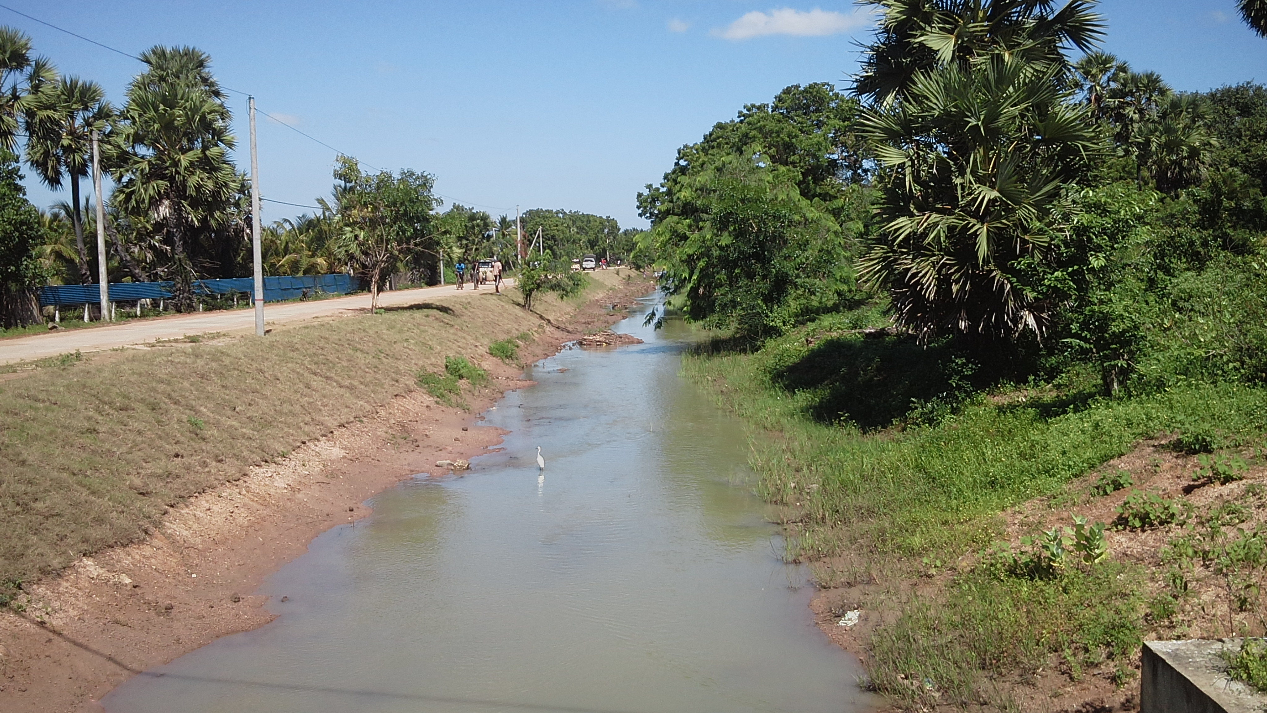 irana